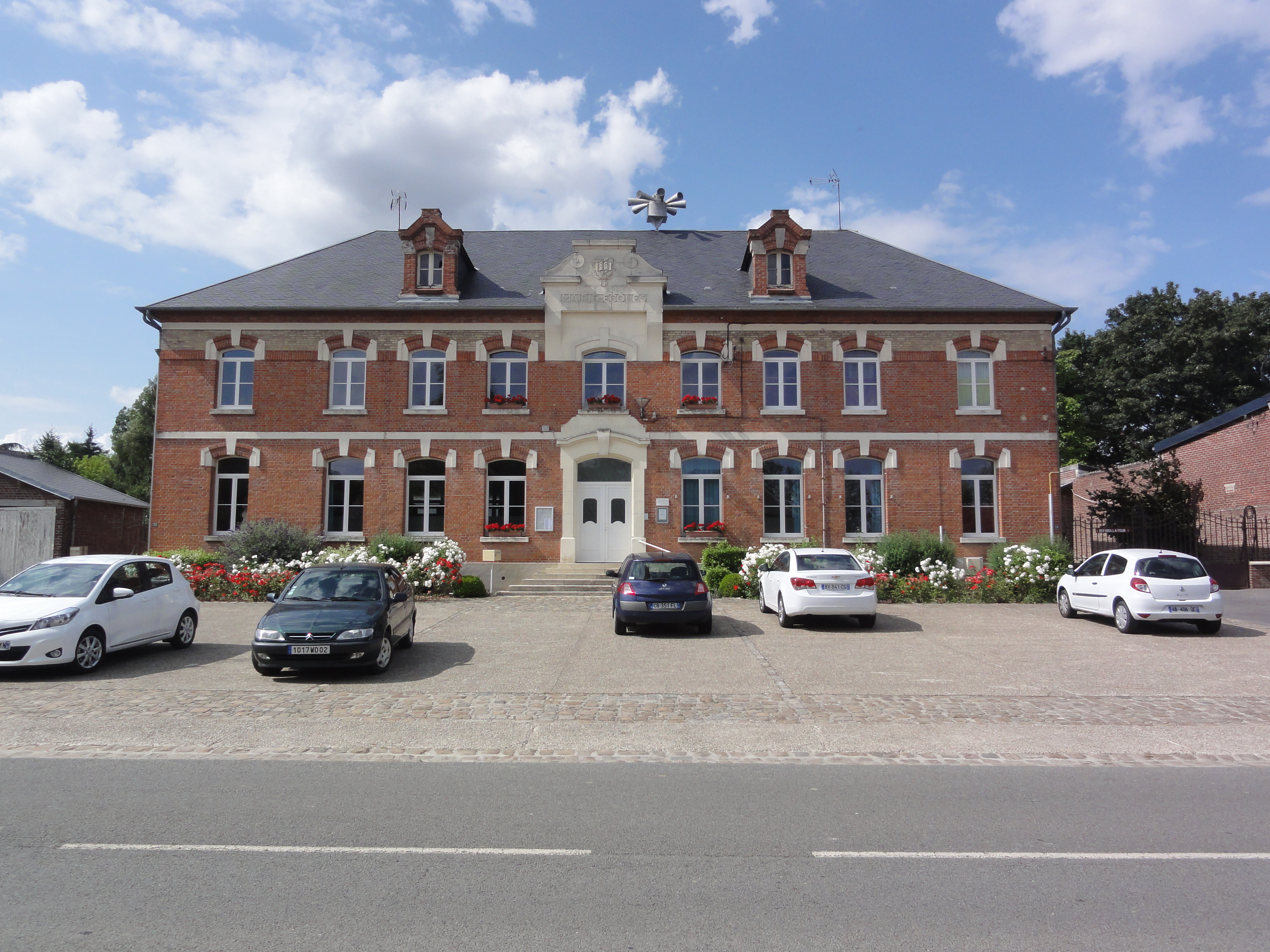 Clastres (Aisne) mairie